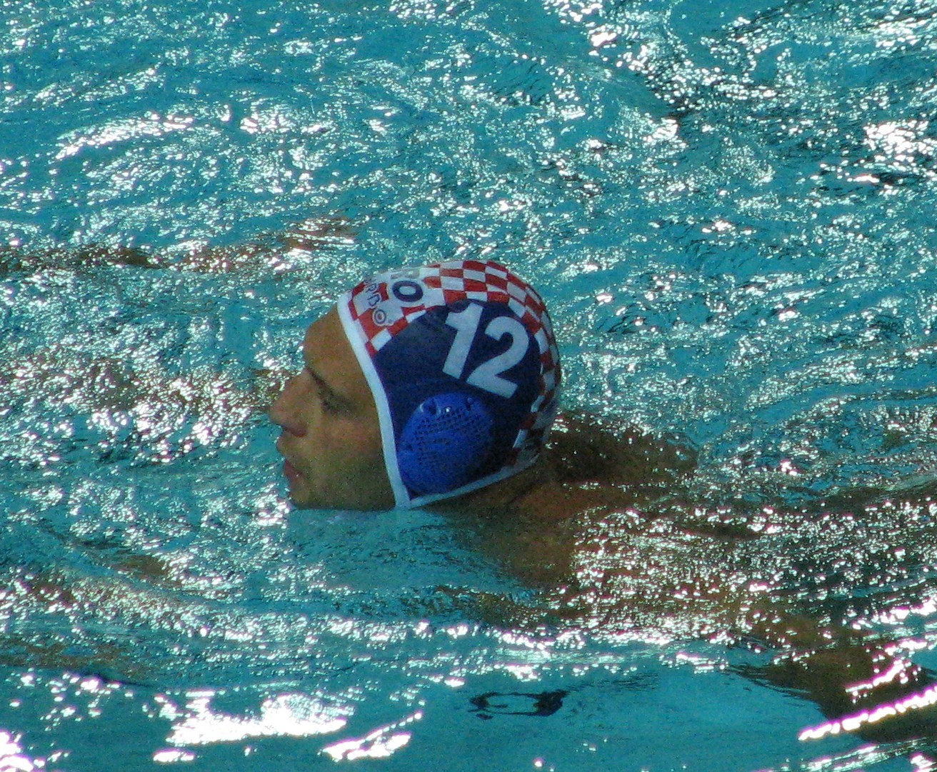 Paulo Obradović